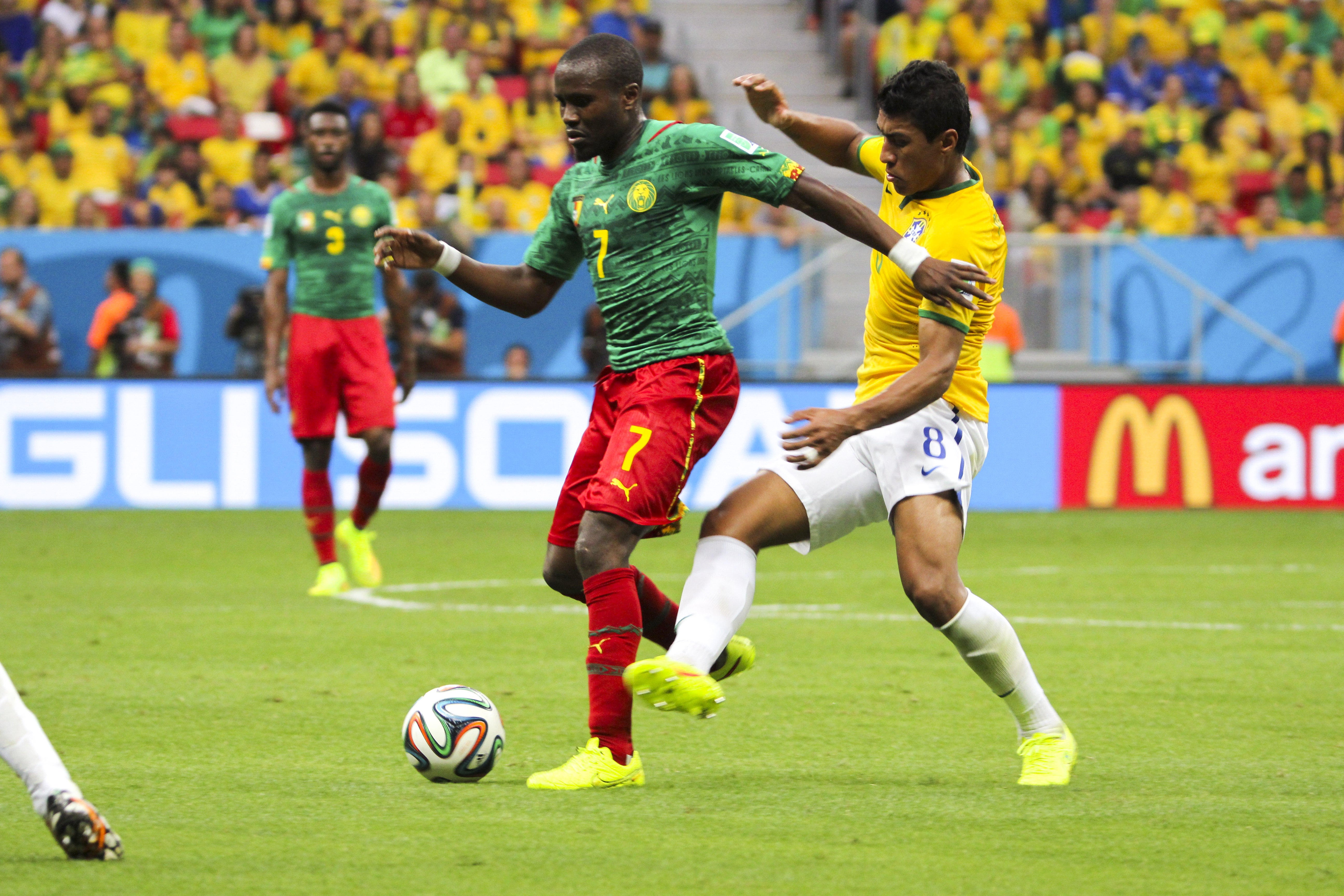 Brasil x Camarões, no Estádio Nacional Mané Garrincha em Brasília.